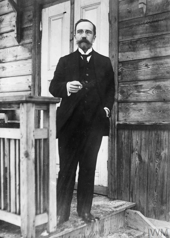 Q 23885: Lev Kamenev, the Head of the Soviet Delegation, in front of a building in Brest-Litovsk. Photograph probably taken in December 1917 by German official photographer .